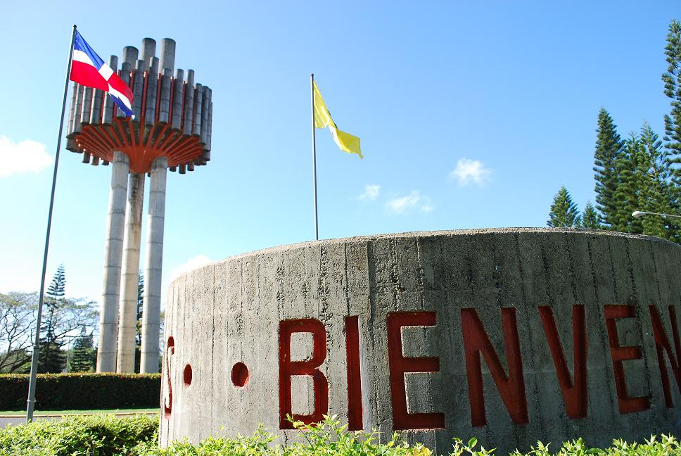 Simbolo Campus PUCMM - Tanque Universitario